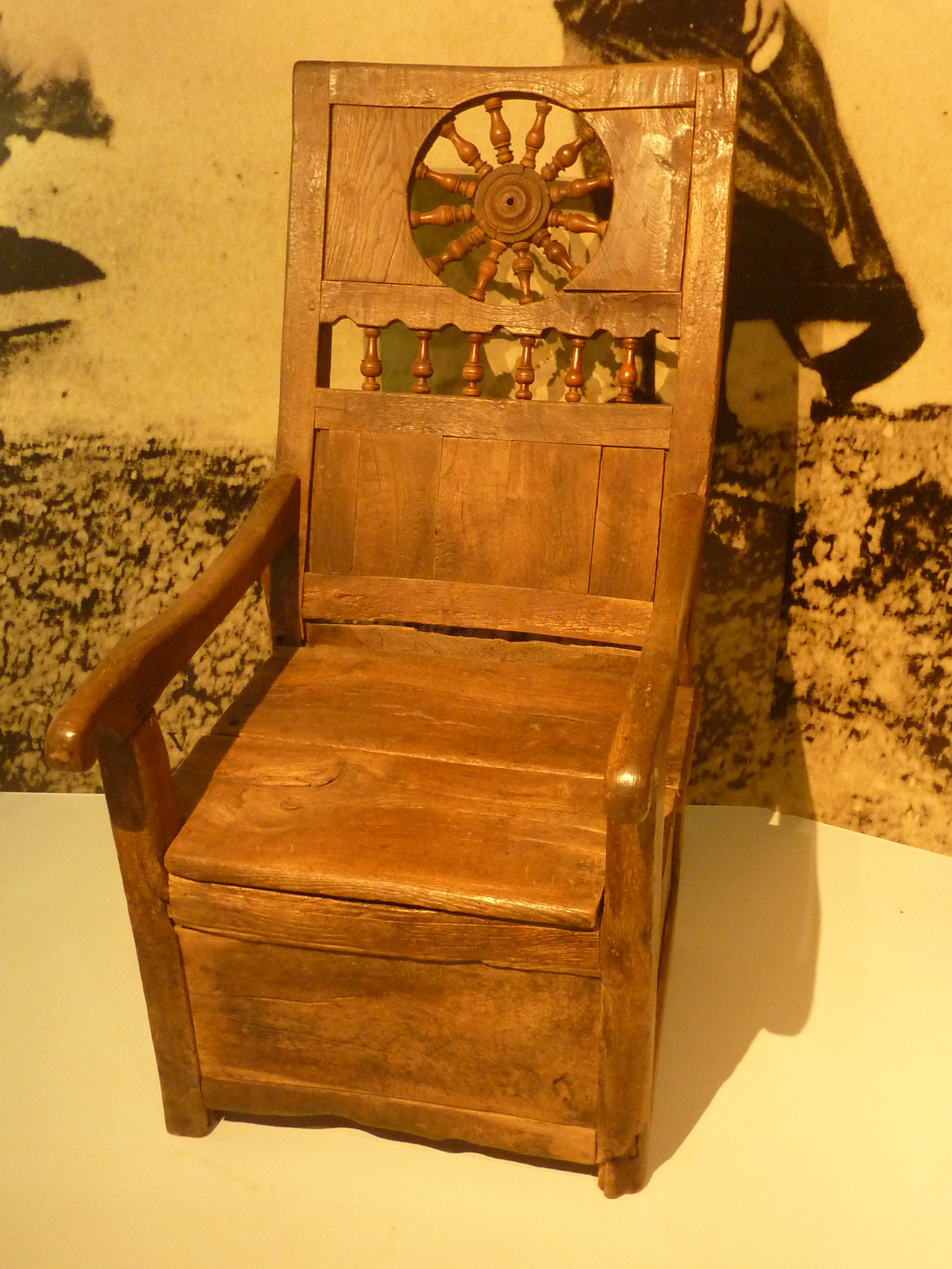 Fauteuil à sel Tad Coz (en châtaigner, buis gravé et fer forgé). Utilisé dans le Finistère, et constituant aussi un siège pour une personne âgée, il possède un coffre servant à stocker le sel (Musée des civilisations de l'Europe et de la Méditerranée, Marseille).